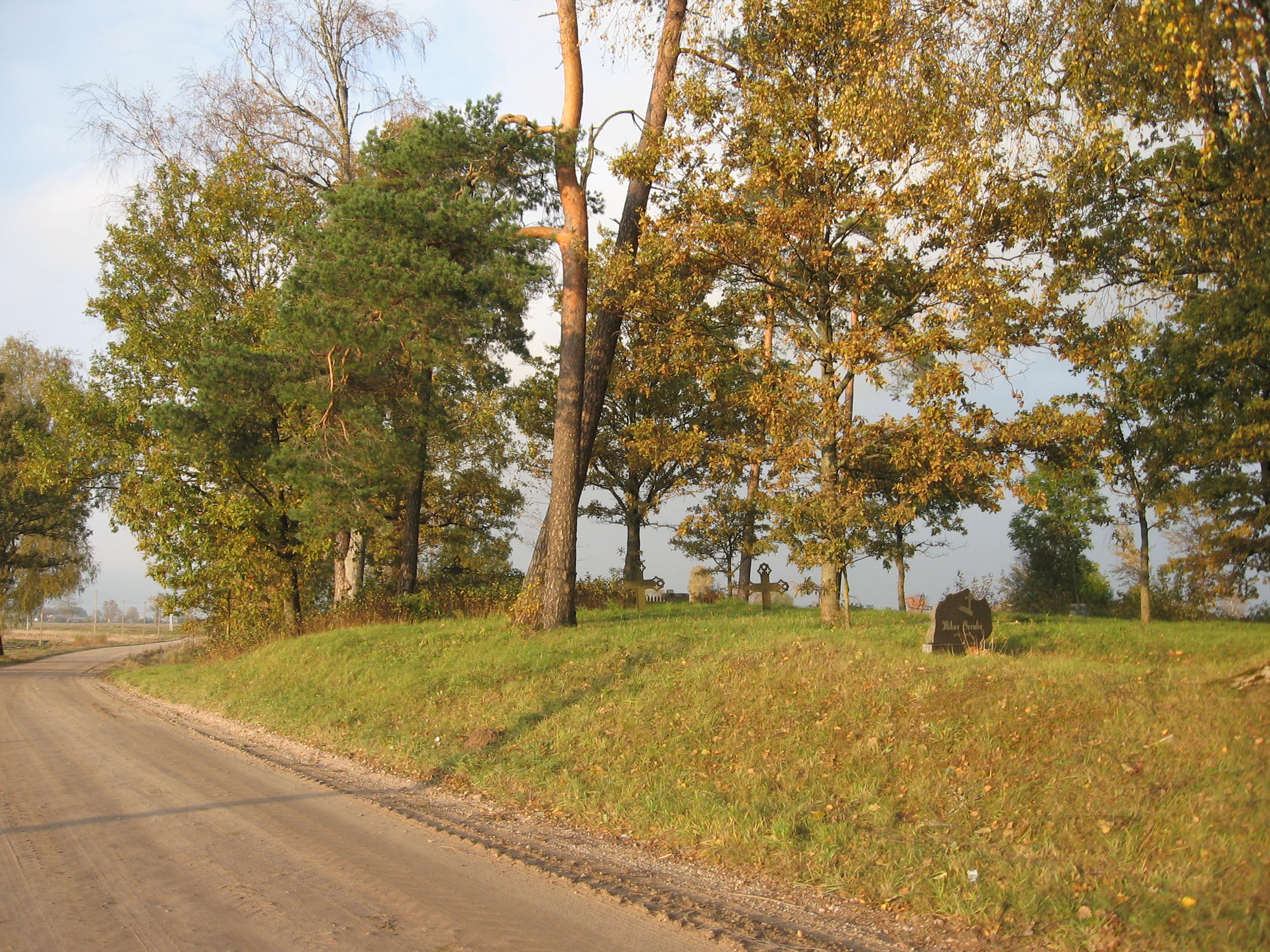 Laugaliai. Evangelikų liuteronų kapinaitės